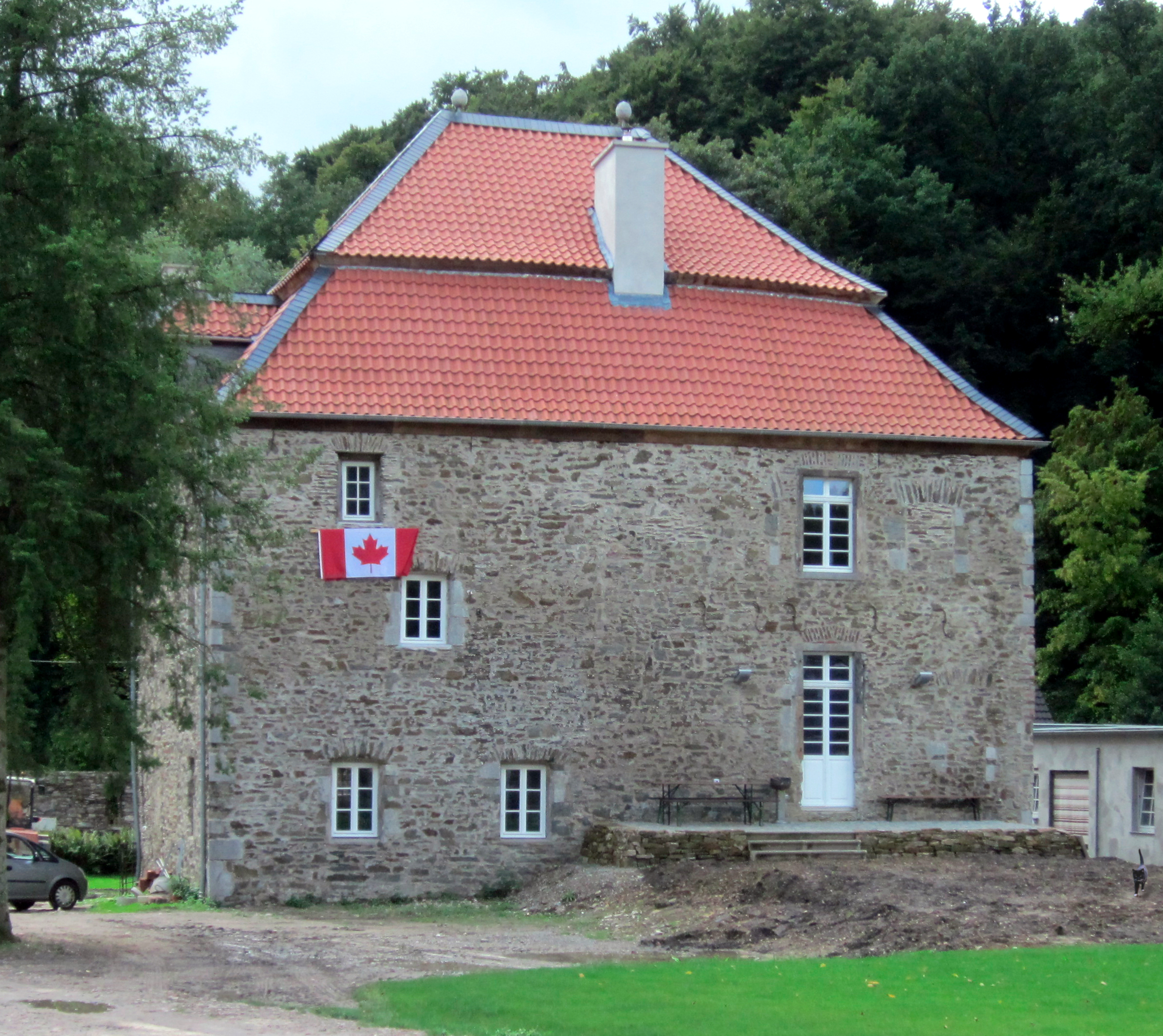 Haus Anger von NordenThis is a photograph of an architectural monument., no. 0